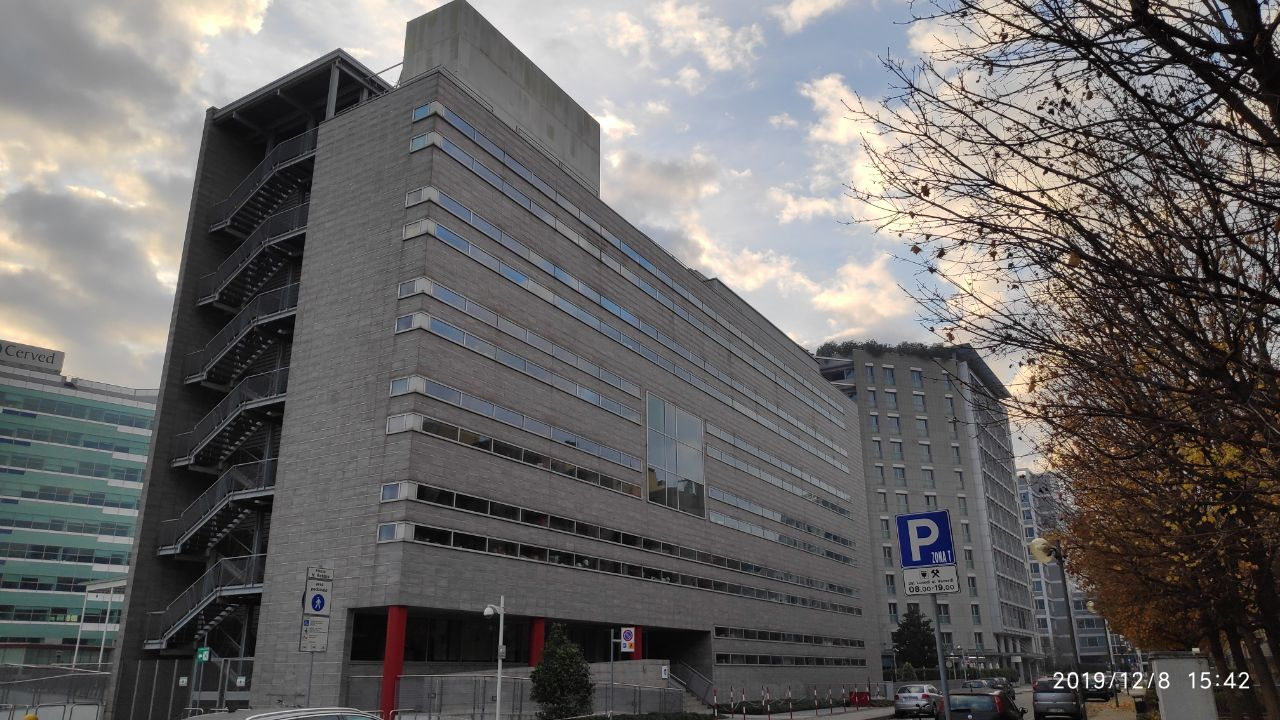 Palazzo di Snam in via Maastricht a San Donato Milanese (dicembre 2019)